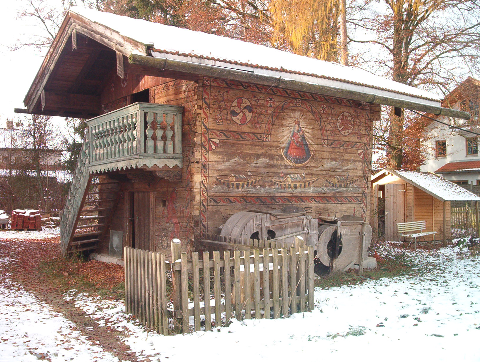 Summary Quelle: selbst fotografiert, 11/2005 Fotograf: Späth Chr. Lizenzstatus: Licensing